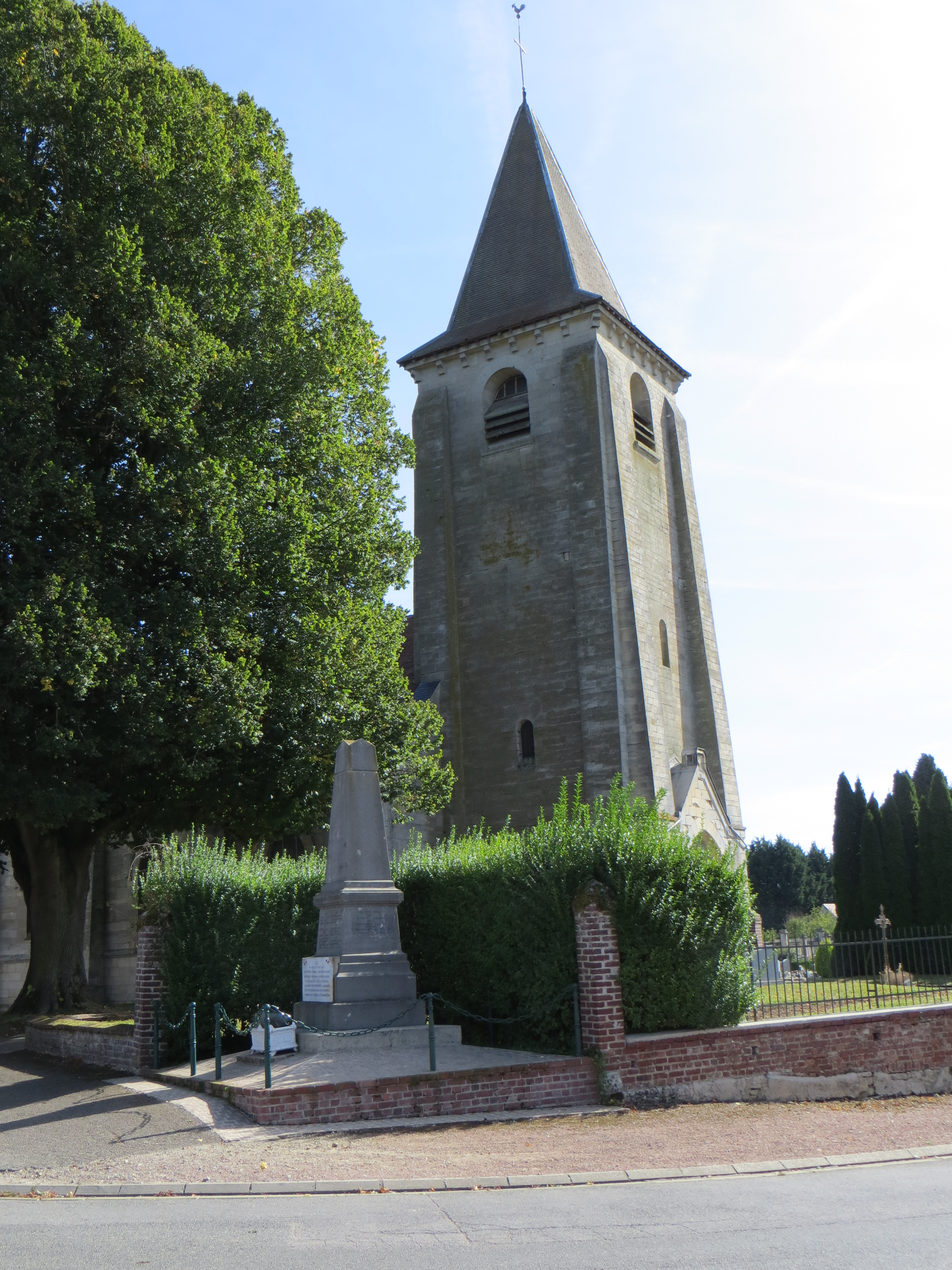 Clocher de l'église et monument aux morts